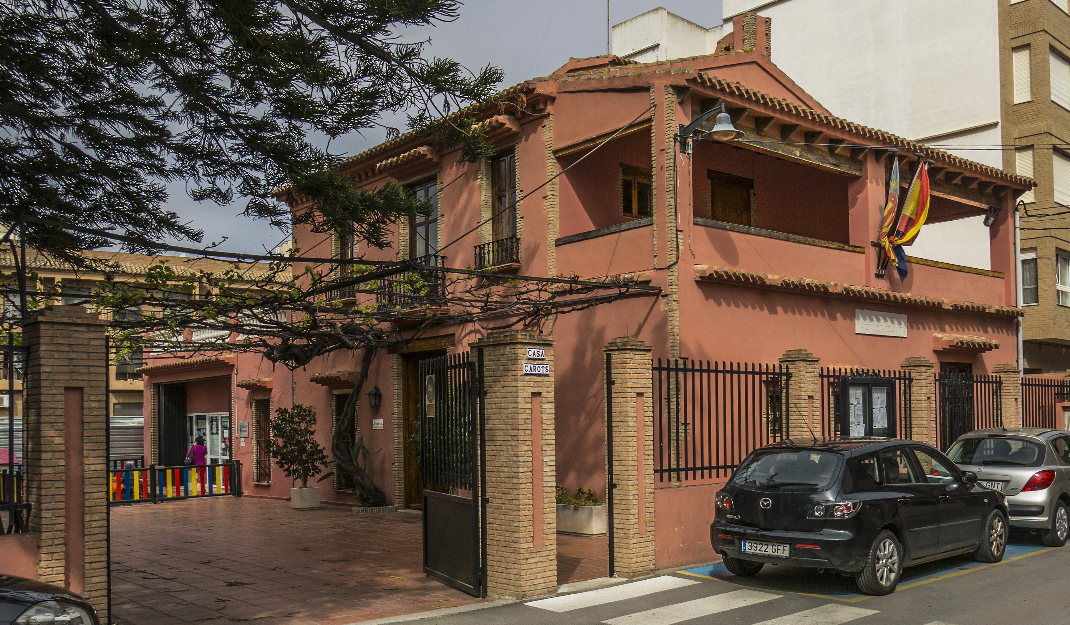 Mareny de Barraquetes és una localitat del País Valencià, antiga pedania del municipi de Sueca i des del 12 de desembre de 1999, definida com a entitat d'àmbit territorial inferior al municipi, EATIM. Es troba enclavat en el Parc Natural de l'Albufera de València i al costat de la mar (Viquipèdia)